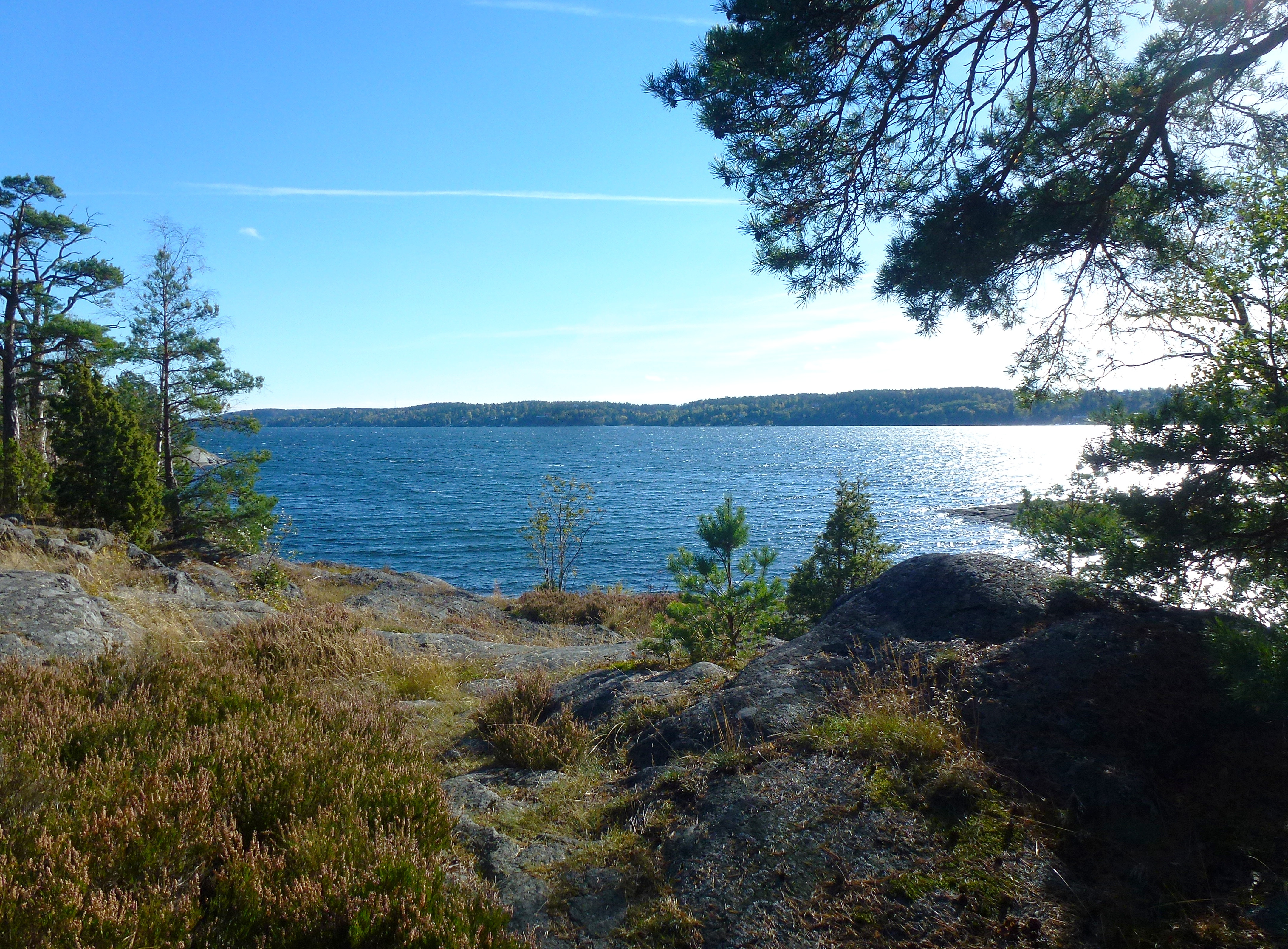 Svärdsö naturreservat, vy mot syd över Erstaviken